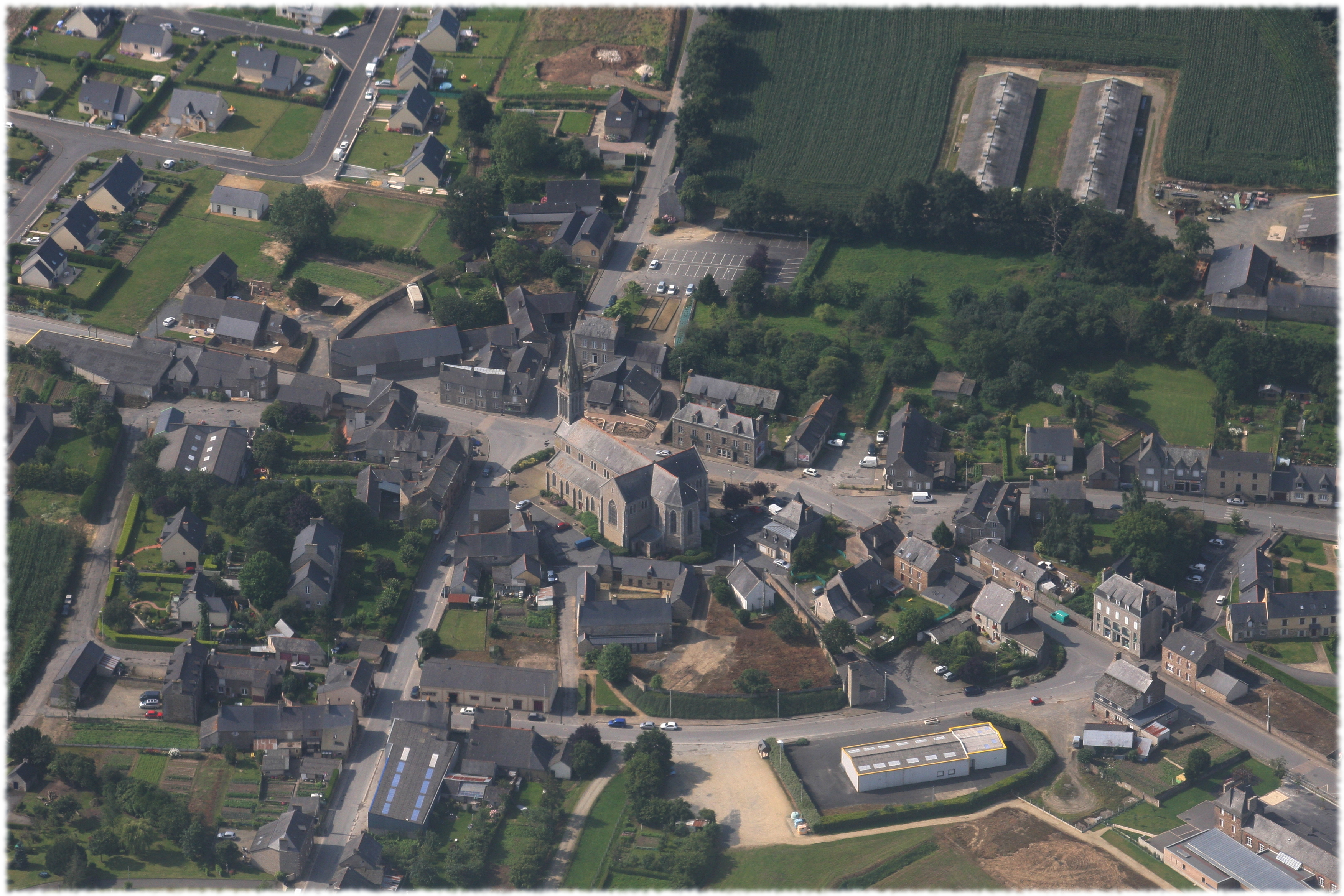 Une vue aérienne du centre de Plouasne.